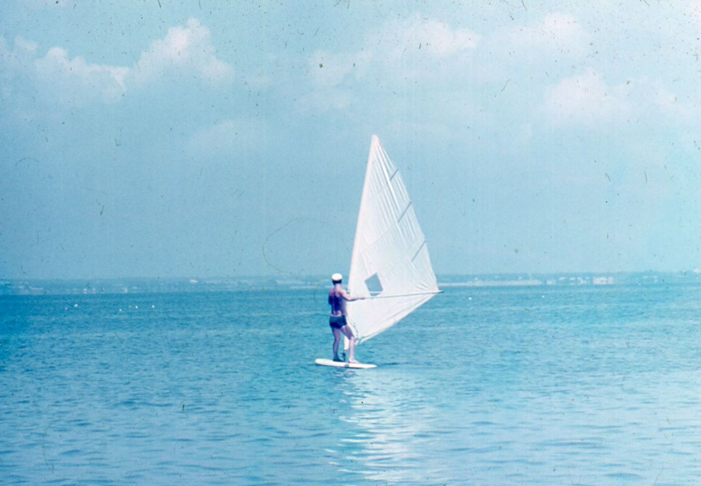 Виндсерфинг, Владивосток, Садгород 1982 год